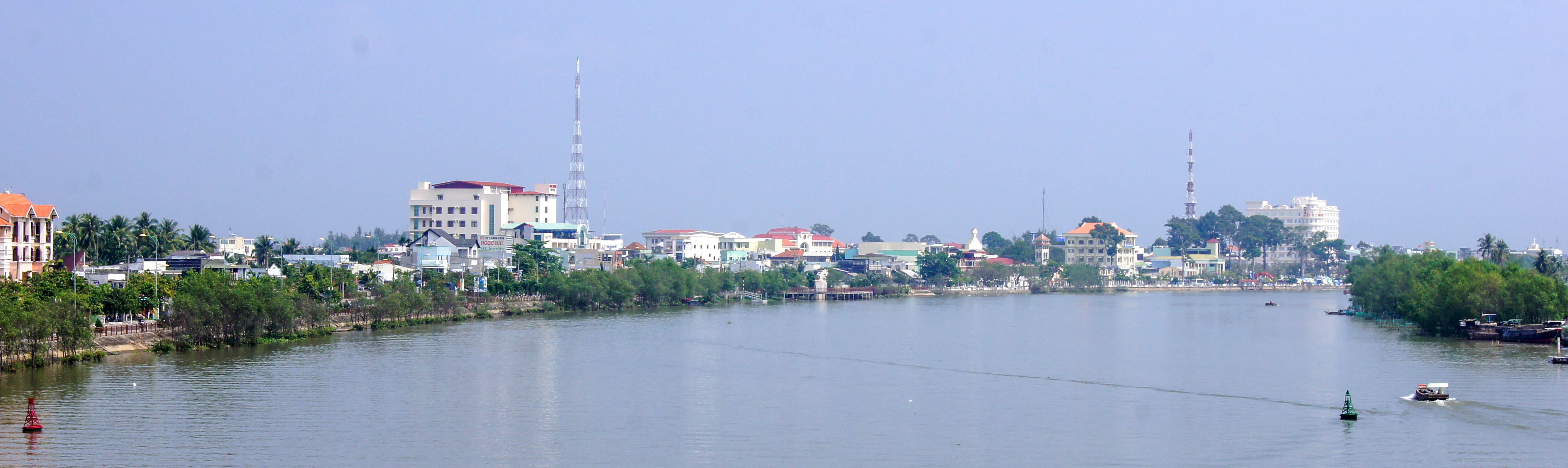 Một góc thành phố Bến Tre nhìn từ sông Bến Tre